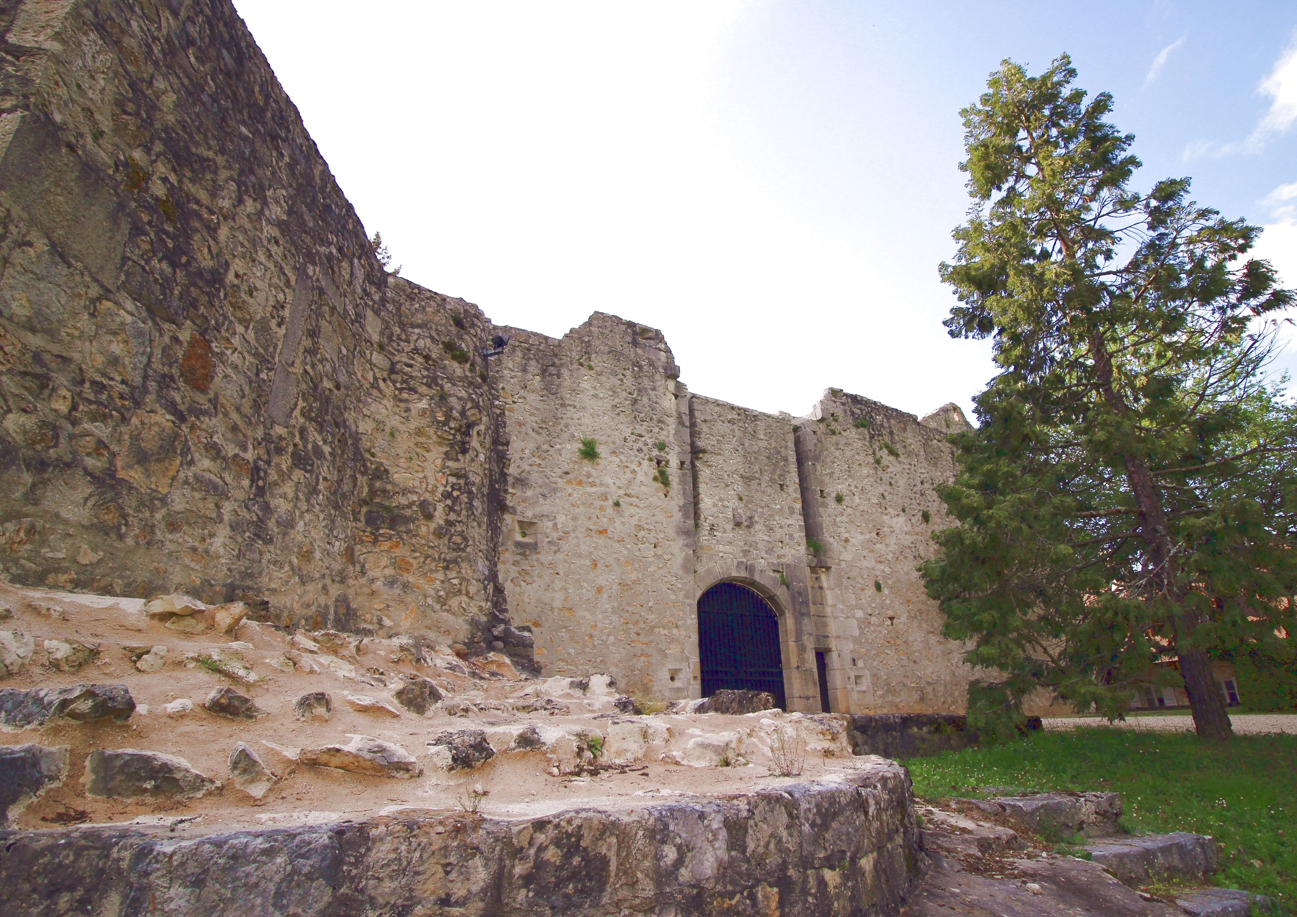 Entrée du château de Groslée.